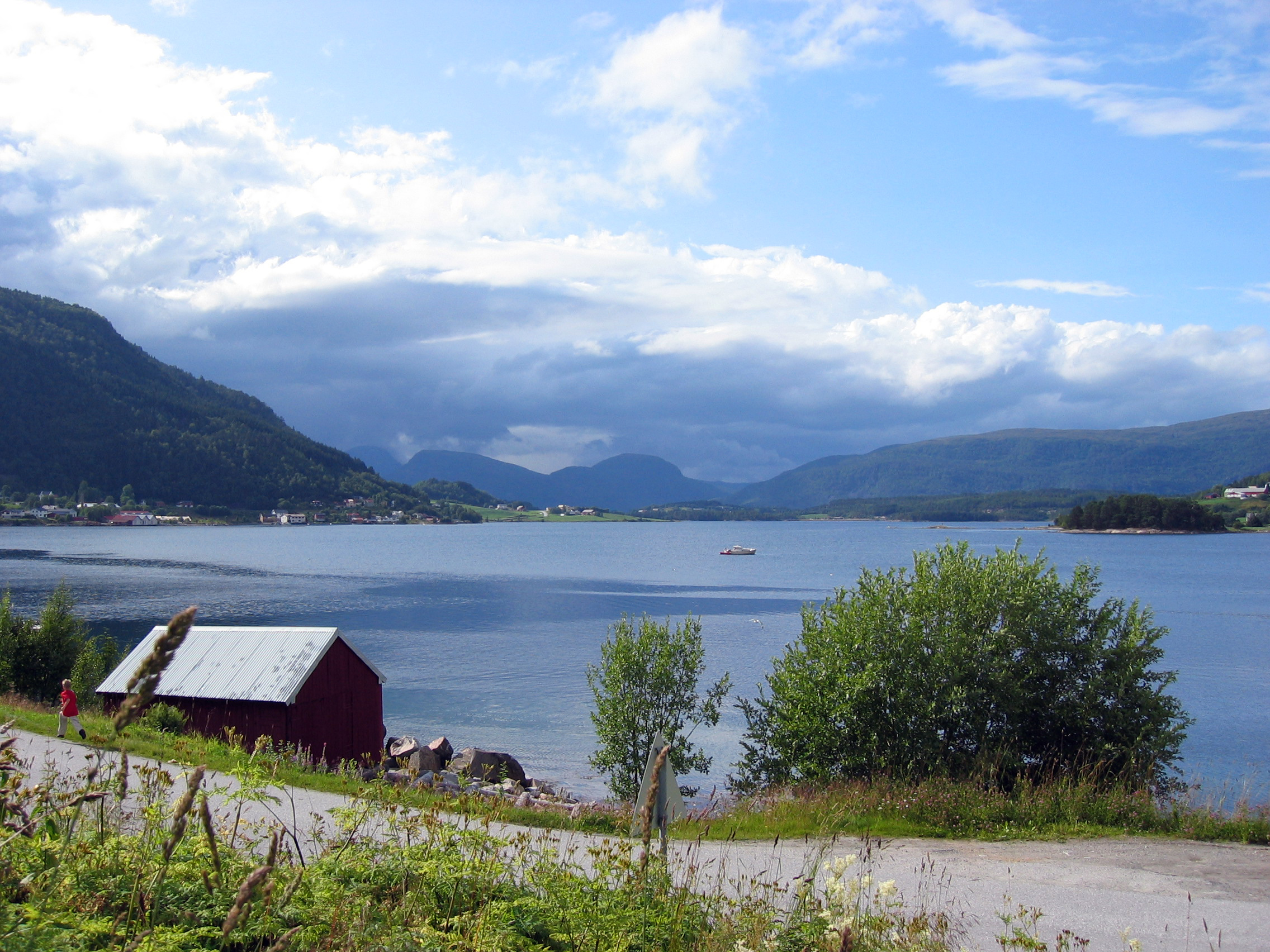 Valsøyfjord i Halsa kommune